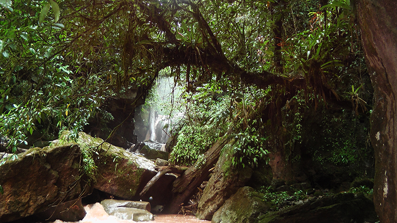 Bosque en la Catarata Bélgica.